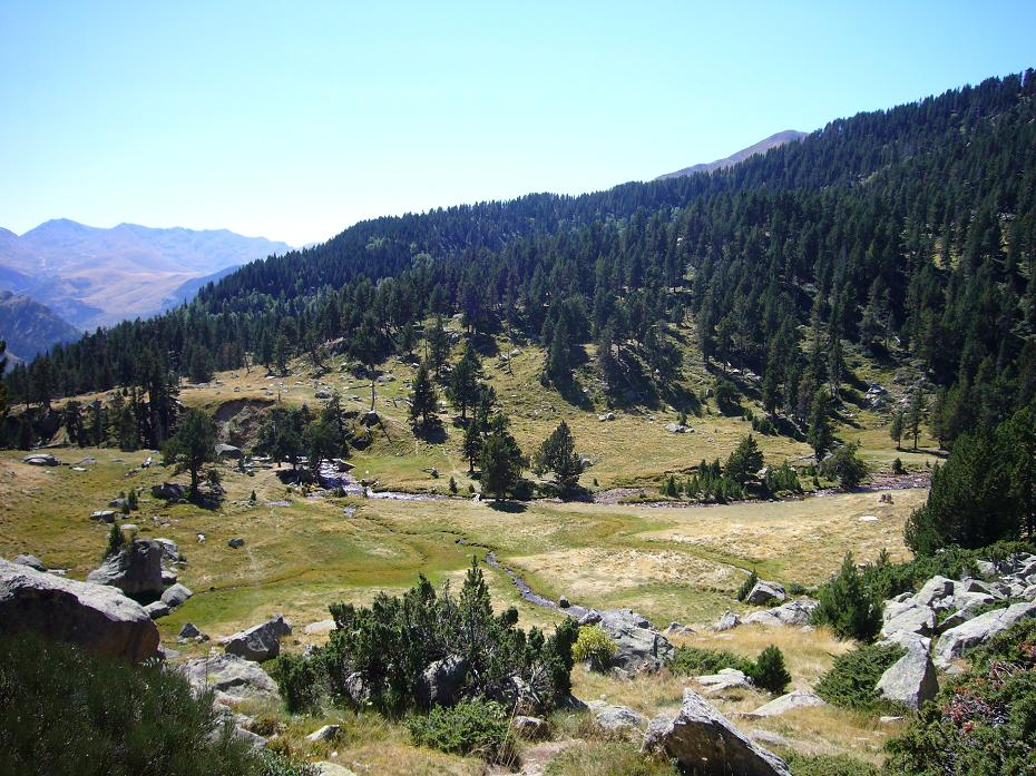 Pla de la Cabana; la Vall de Boí, Alta Ribagorça, Catalunya